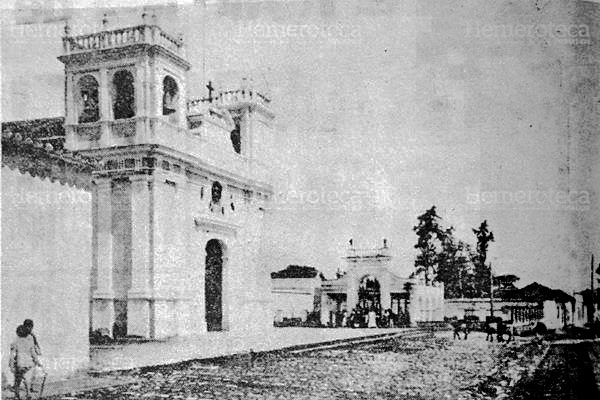 Iglesia de Candelaria en 1900